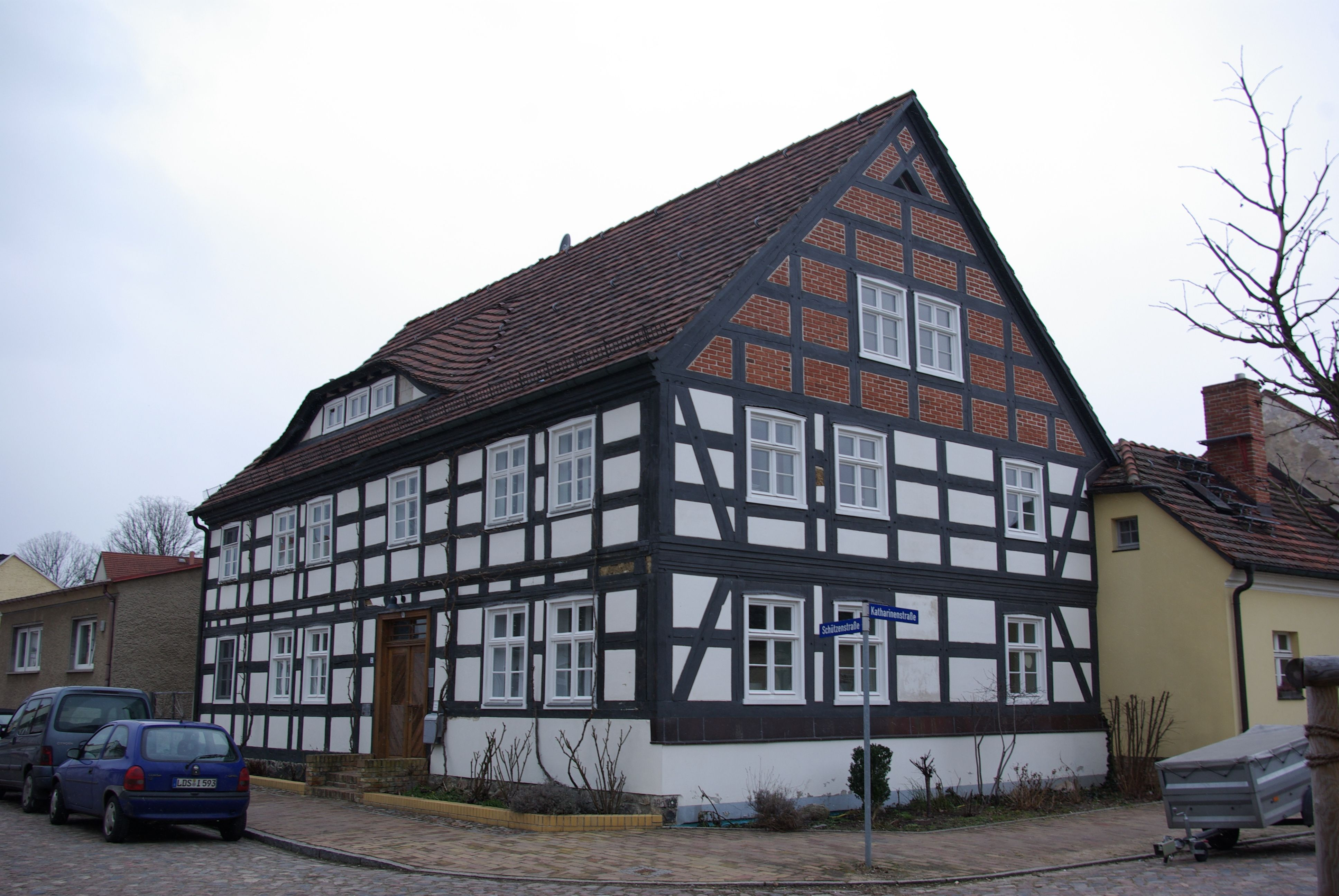 Mittenwalde, Brandenburg. Das Fachwerkhaus in der Schützenstraße 6 stammt aus der ersten Hälfte des 18. Jahrhunderts und ist denkmalgeschützt (geotags in den exif-Daten).